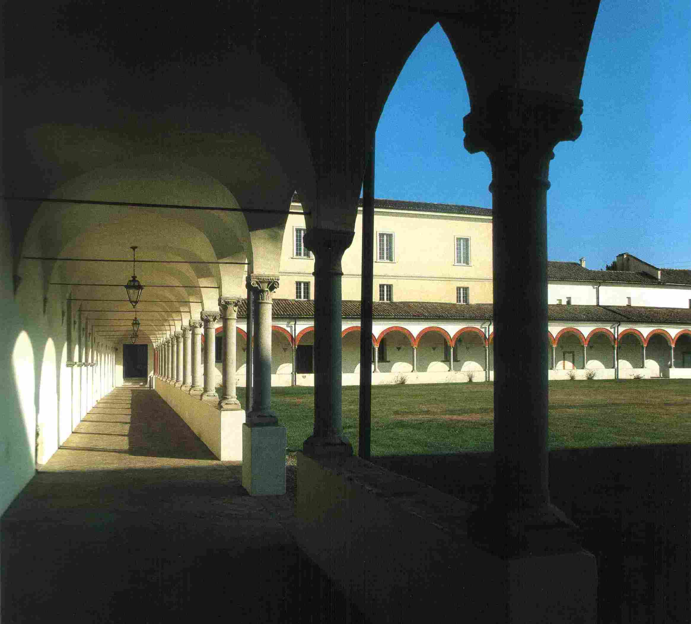 La galleria del chiostro grande della Certosa di San Girolamo (detta Certosa di Parma).